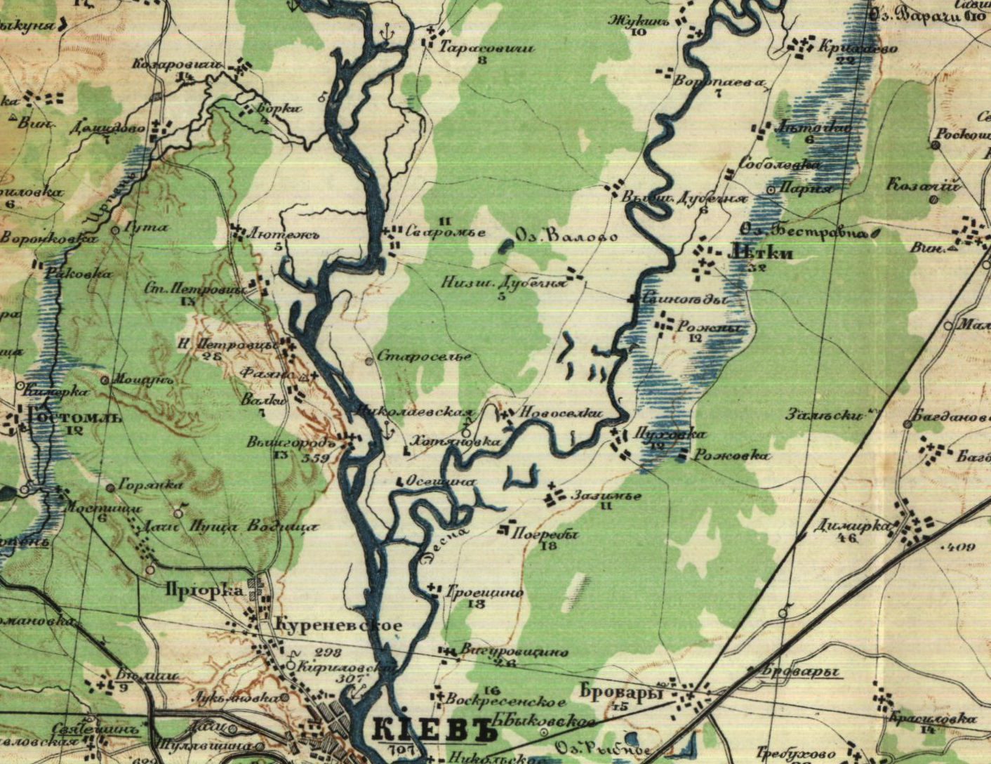 Карта району розташування заповідника Гористе. Фрагмент Спеціальної карти Европейської Росії (Київщина) генерала Стрільбицького І. О.